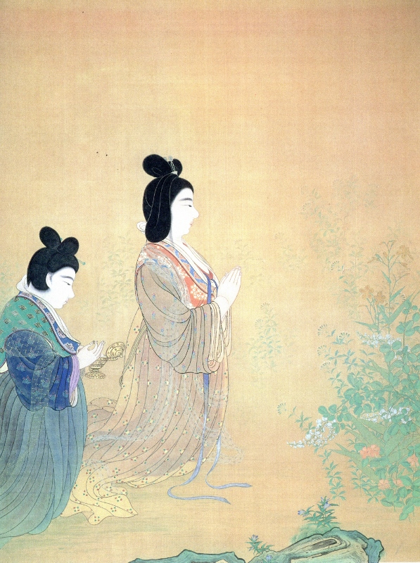 1897年（明治30年）3月、下村観山によって描かれた『光明皇后』、宮内庁三の丸尚蔵館所蔵。絹本著色。231.0x173.0㎝。